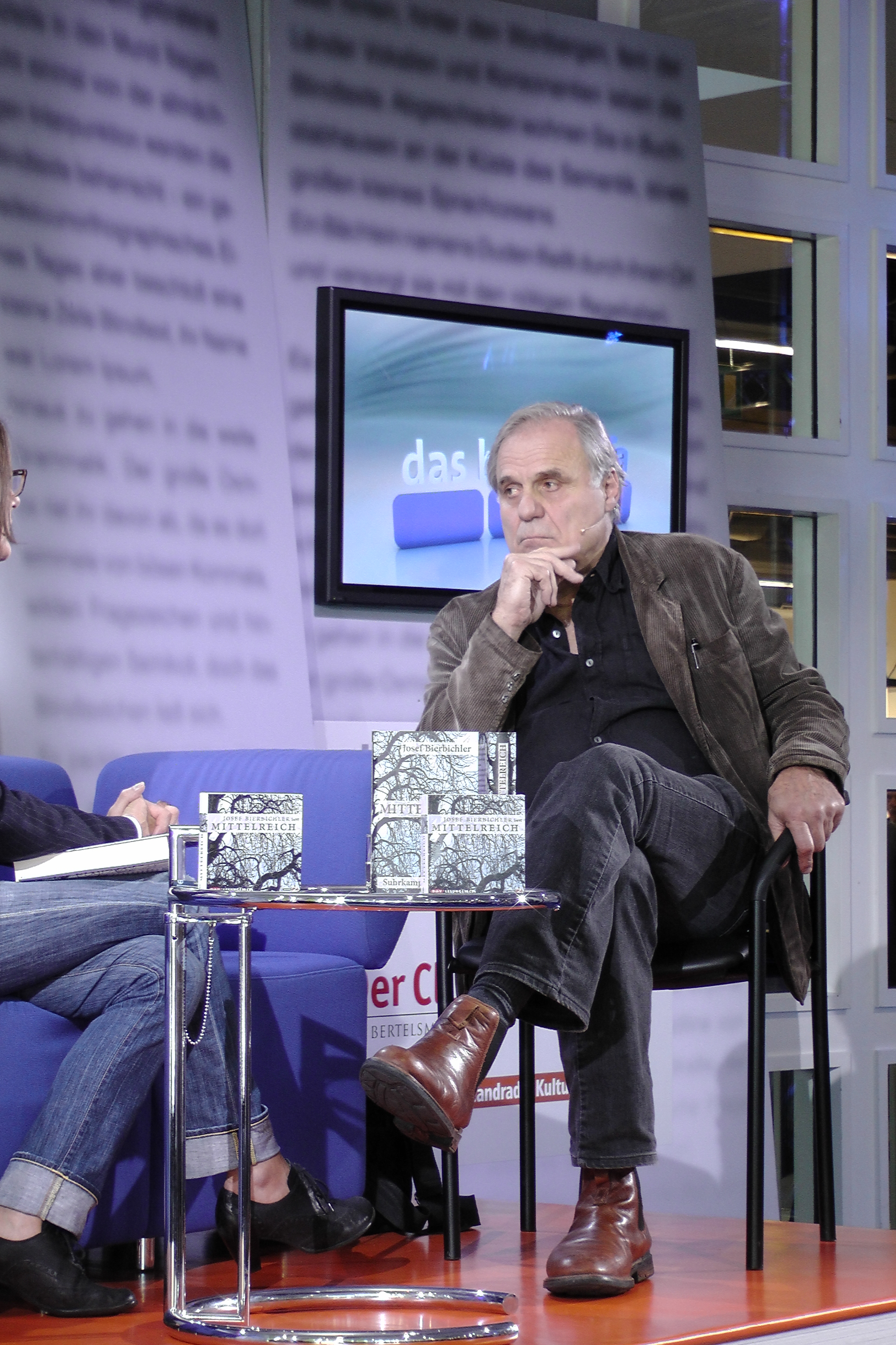 Dieses Fotos dürfen Sie honorarfrei nutzen, wenn Sie folgenden credit beachten: Copyright: Das blaue Sofa / Club Bertelsmann. Josef Bierbichler wurde 1948 am Starnberger See geboren. Seit Anfang der 70ger Jahre ist er als Theaterschauspieler auf allen großen Bühnen in Deutschland, Österreich und der Schweiz präsent. Mit Regisseuren wie Werner Herzog (Herz aus Glas), Herbert Achternbusch (Servus Bayern, Heilt Hitler!), Tom Tykwer (Die tödliche Maria) und Michael Haneke (Das weiße Band) spielte er in großen Filmen. Bierbichler lebt als Seewirt, Bauer, Schauspieler und Autor am Starnberger See.